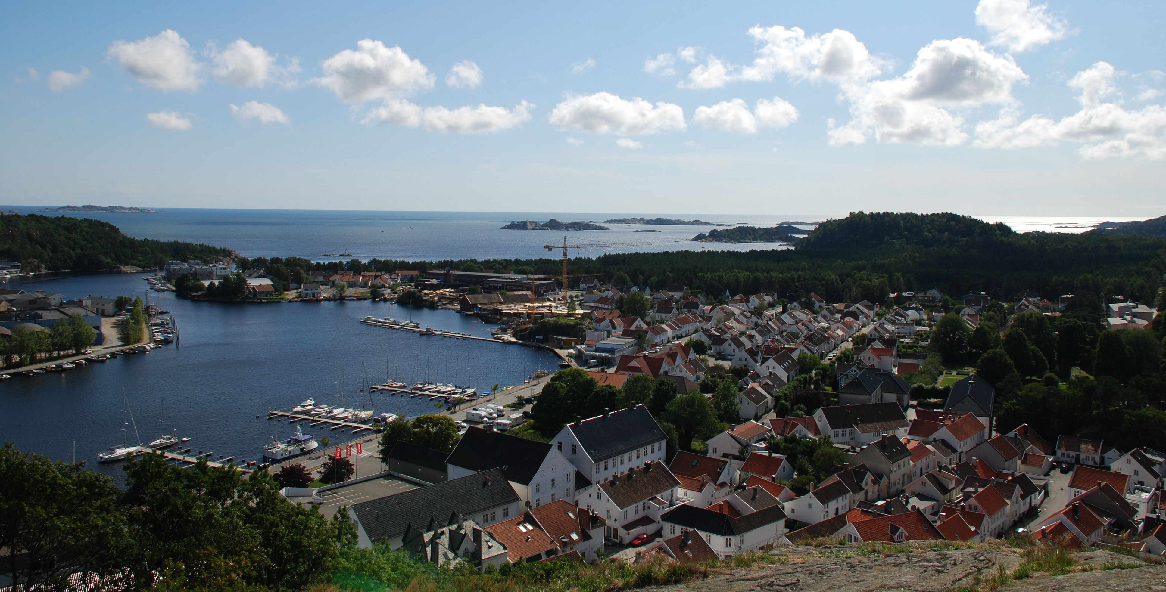 Mandal sentrum og Mandalselva, sett fra uranienborg